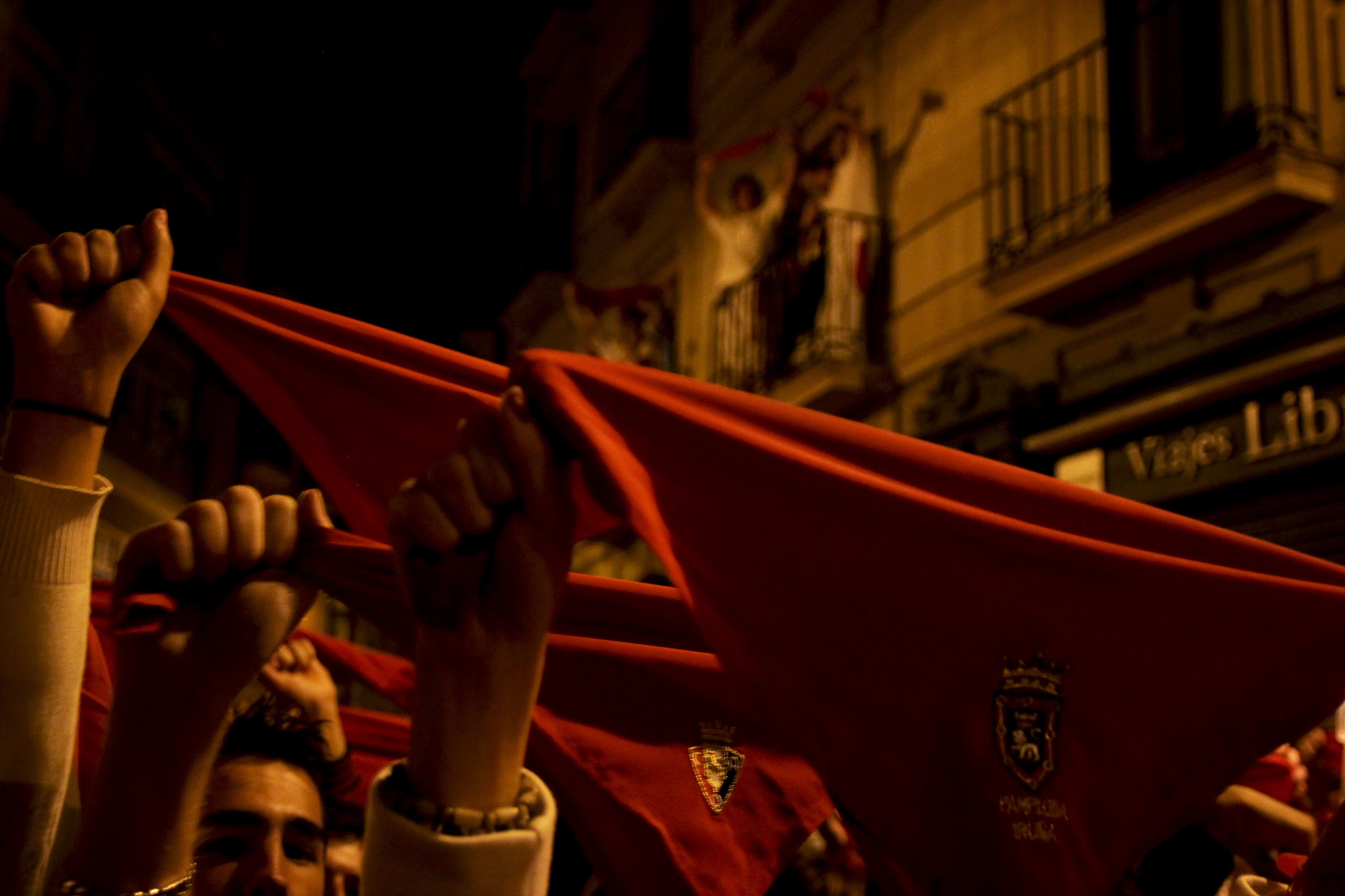 Plaza del Ayuntamiento en el "Pobre de mí"